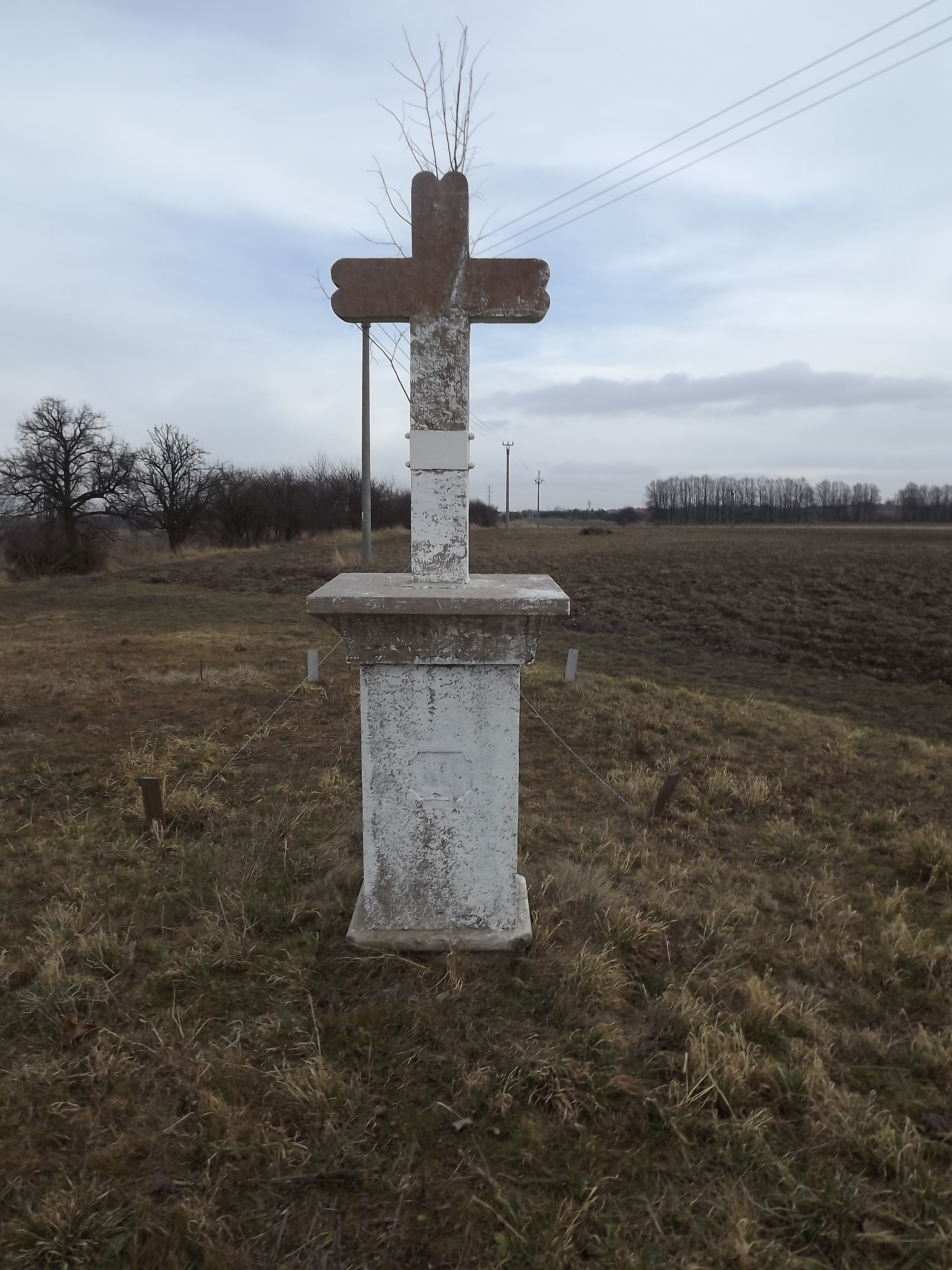 Svárov, kříž u Rymáně